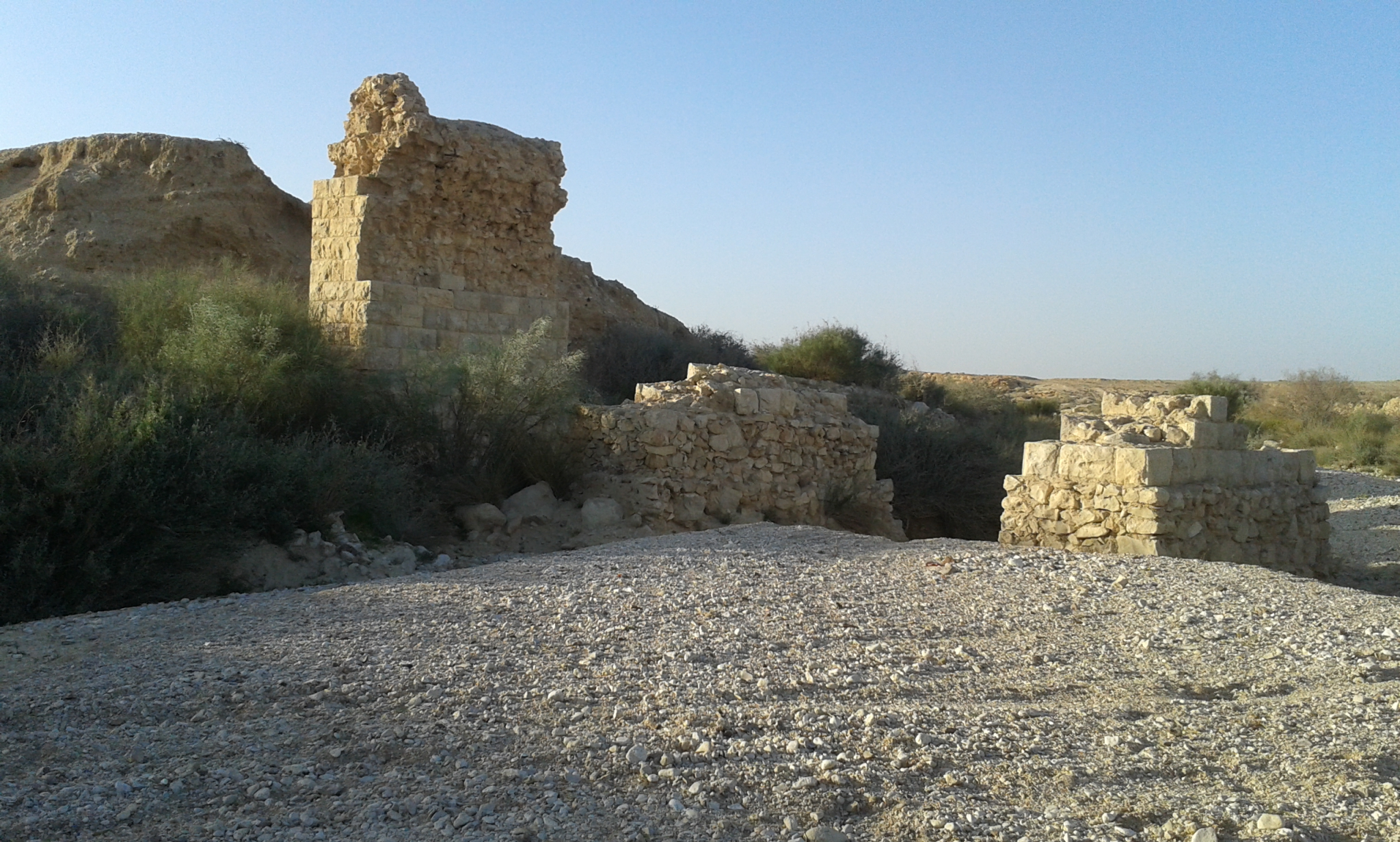 נחל לבן - גשר הרכבת הטורקי